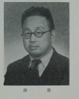 中國人民政治協商會議第一屆全體會議代表